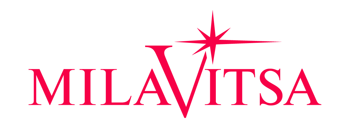 Логотип компании "Милавица"